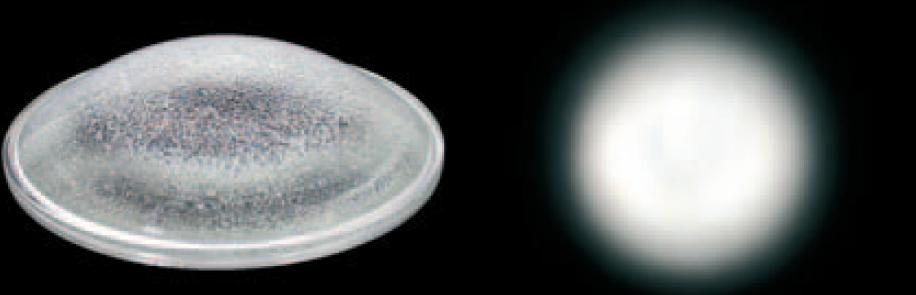 Exemple lentille martelée - Bensti (d) 25 mars 2008 à 22:31 (CET)